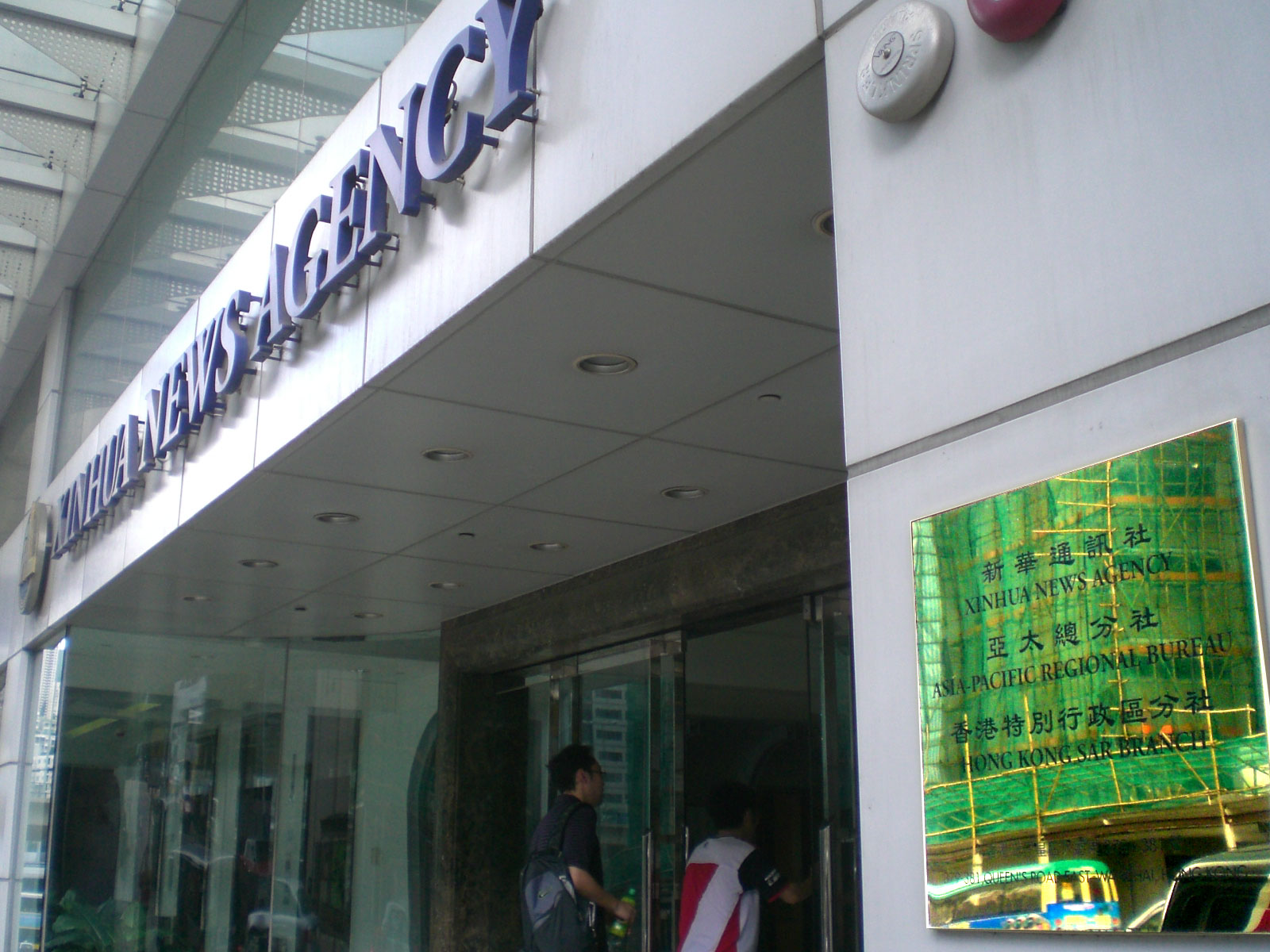 中文（香港）: 新華通訊社香港分社, 灣仔皇后大道東